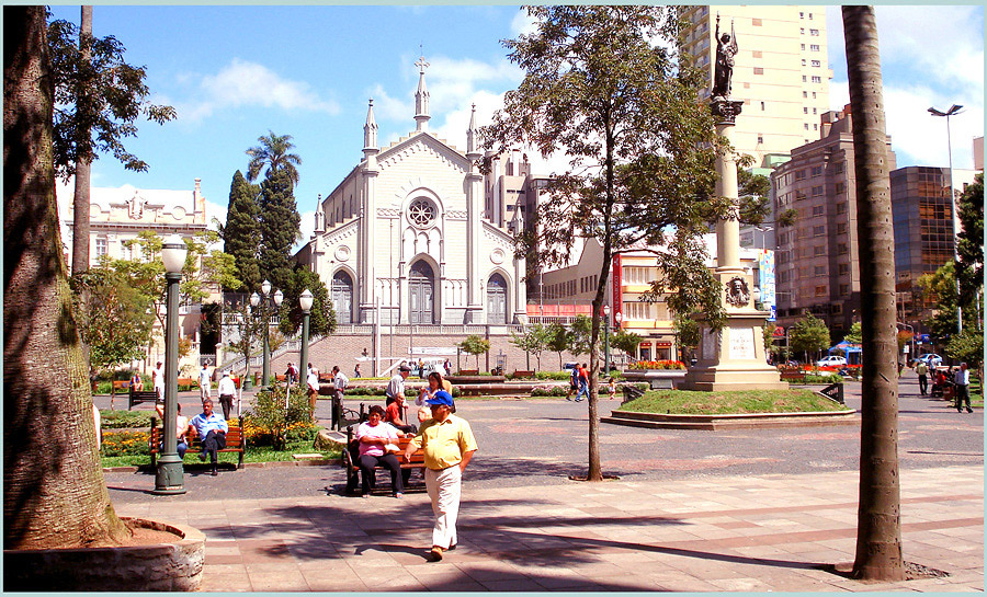 Catedral de Santa Teresa, Caxias do Sul, Brazil, vista da Praça Dante Alighieri.